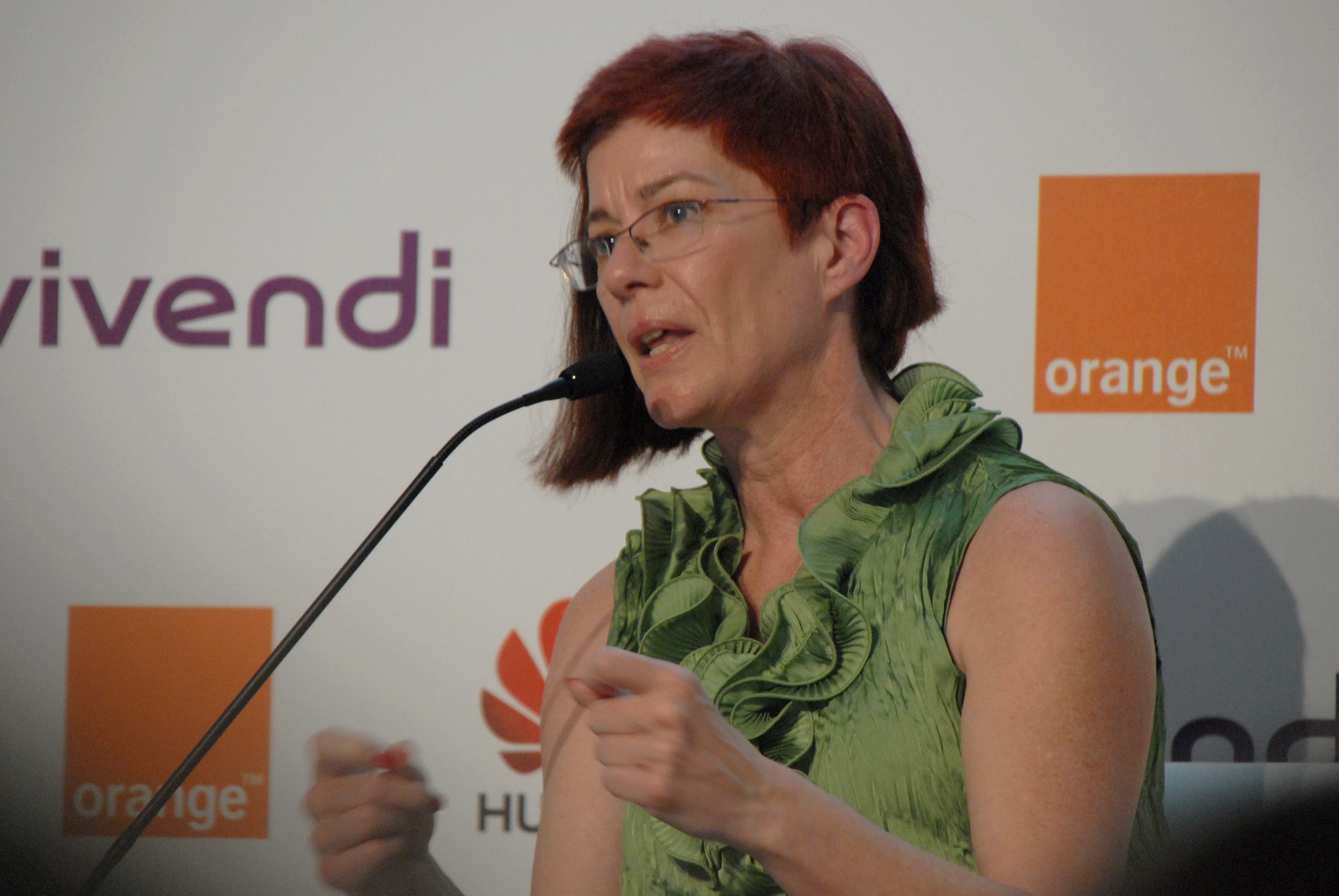 Mitchell Baker, présidente de la Mozilla Foundation, lors d'un workshop organisé pour l'e-G8